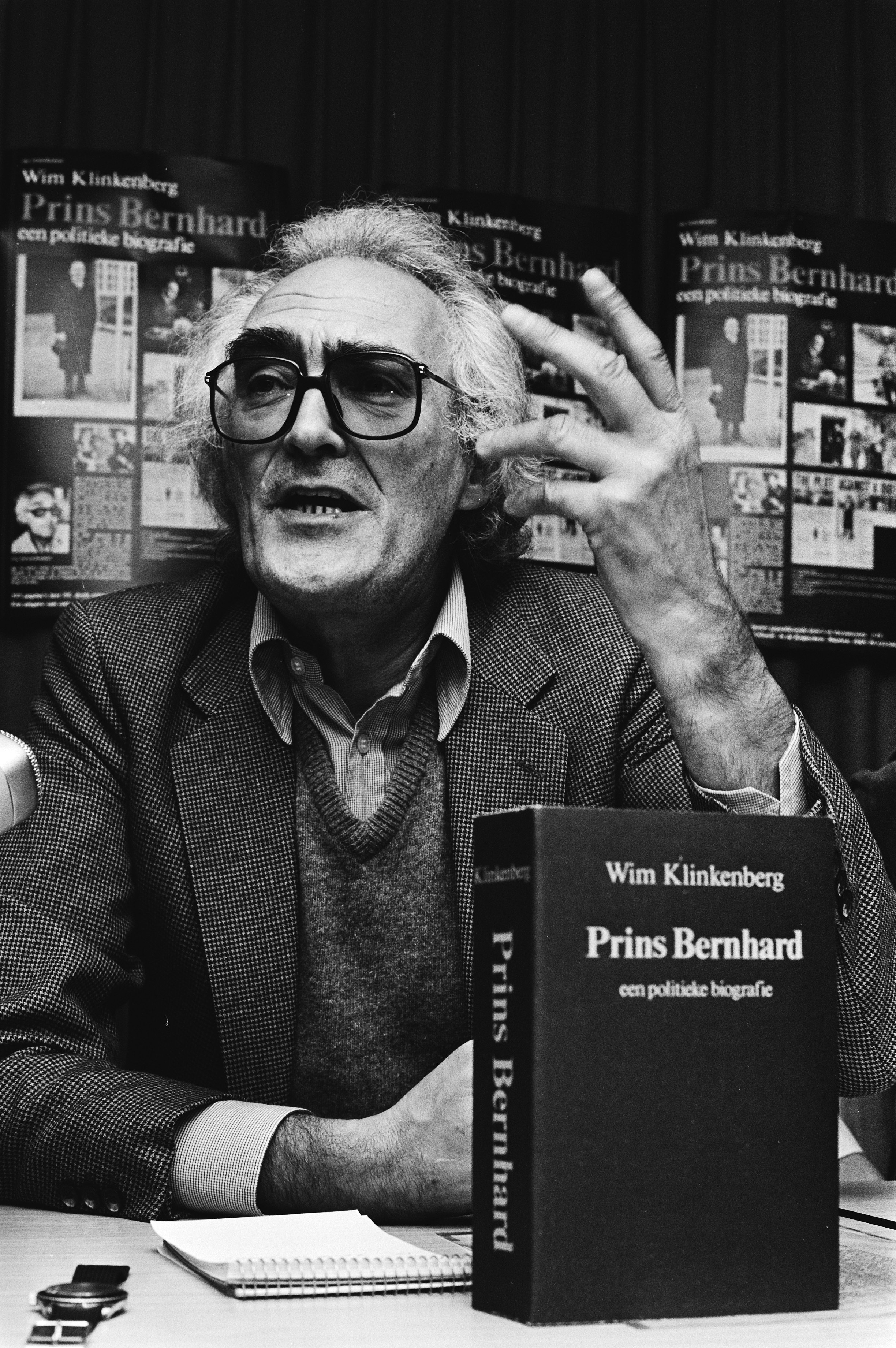 Wim Klinkenberg tijdens de presentatie van zijn boek, " Prins Bernhard, een politieke biografie".